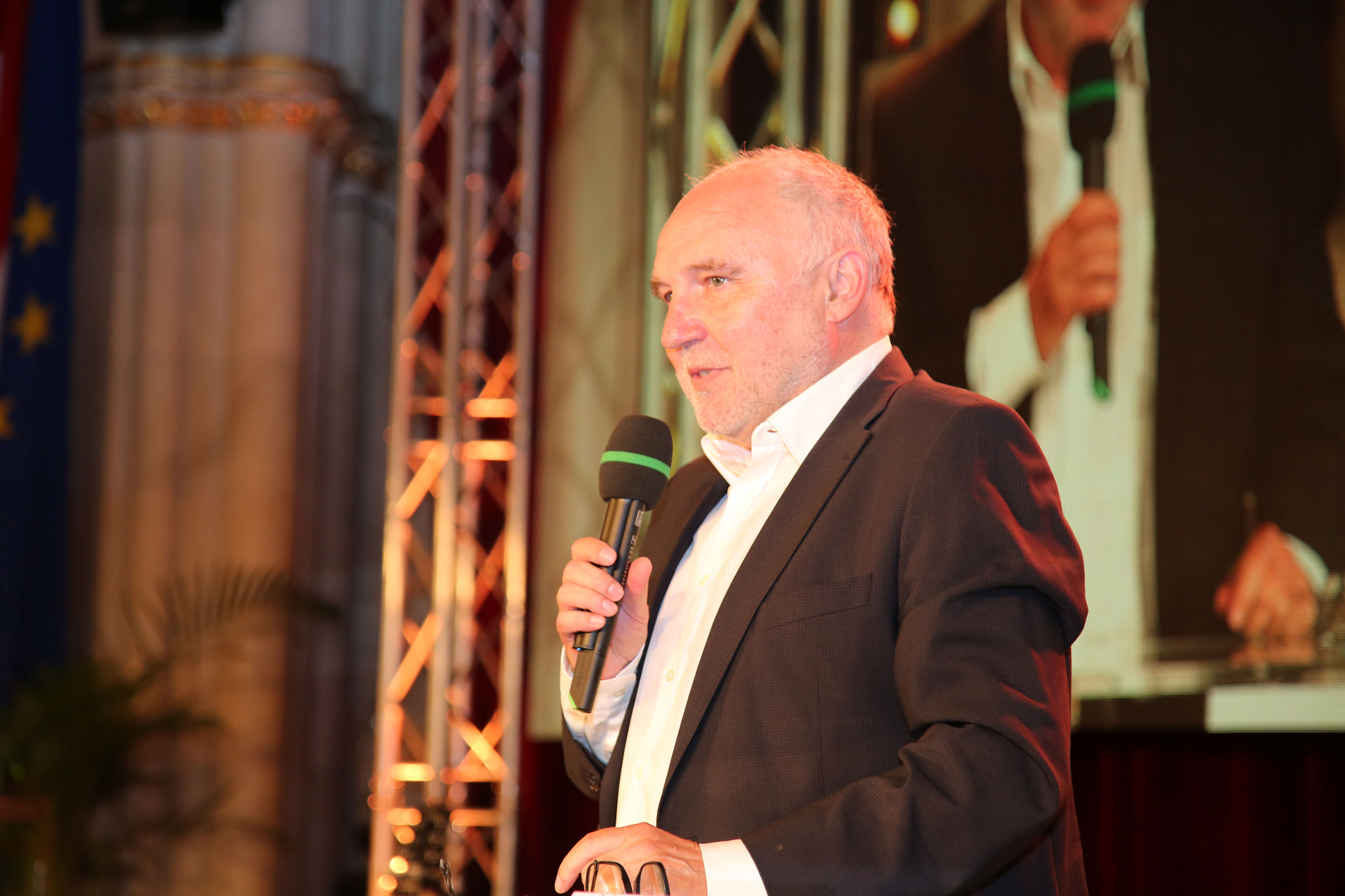 02Amon_Karl-5402